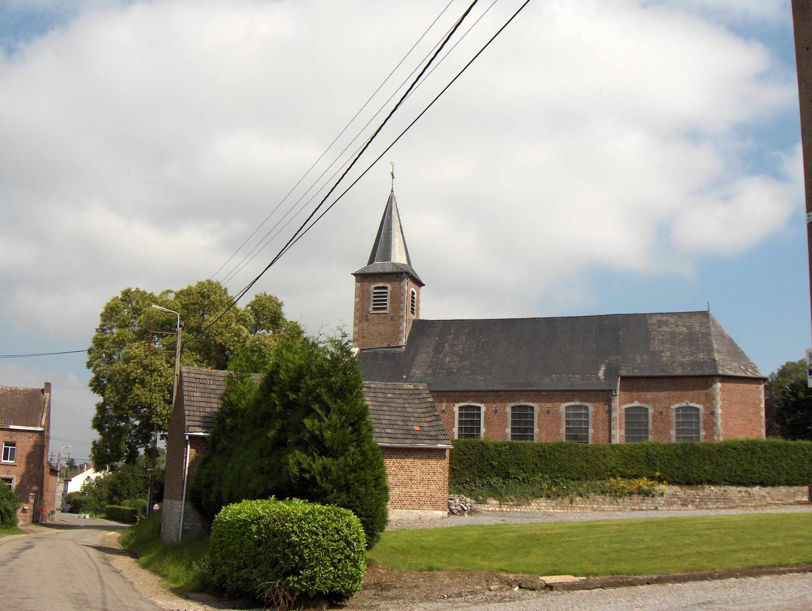 Bertrée (Ortsteil der Gemeinde Hannut, Belgien, Prov. Lüttich), Dorfkirche